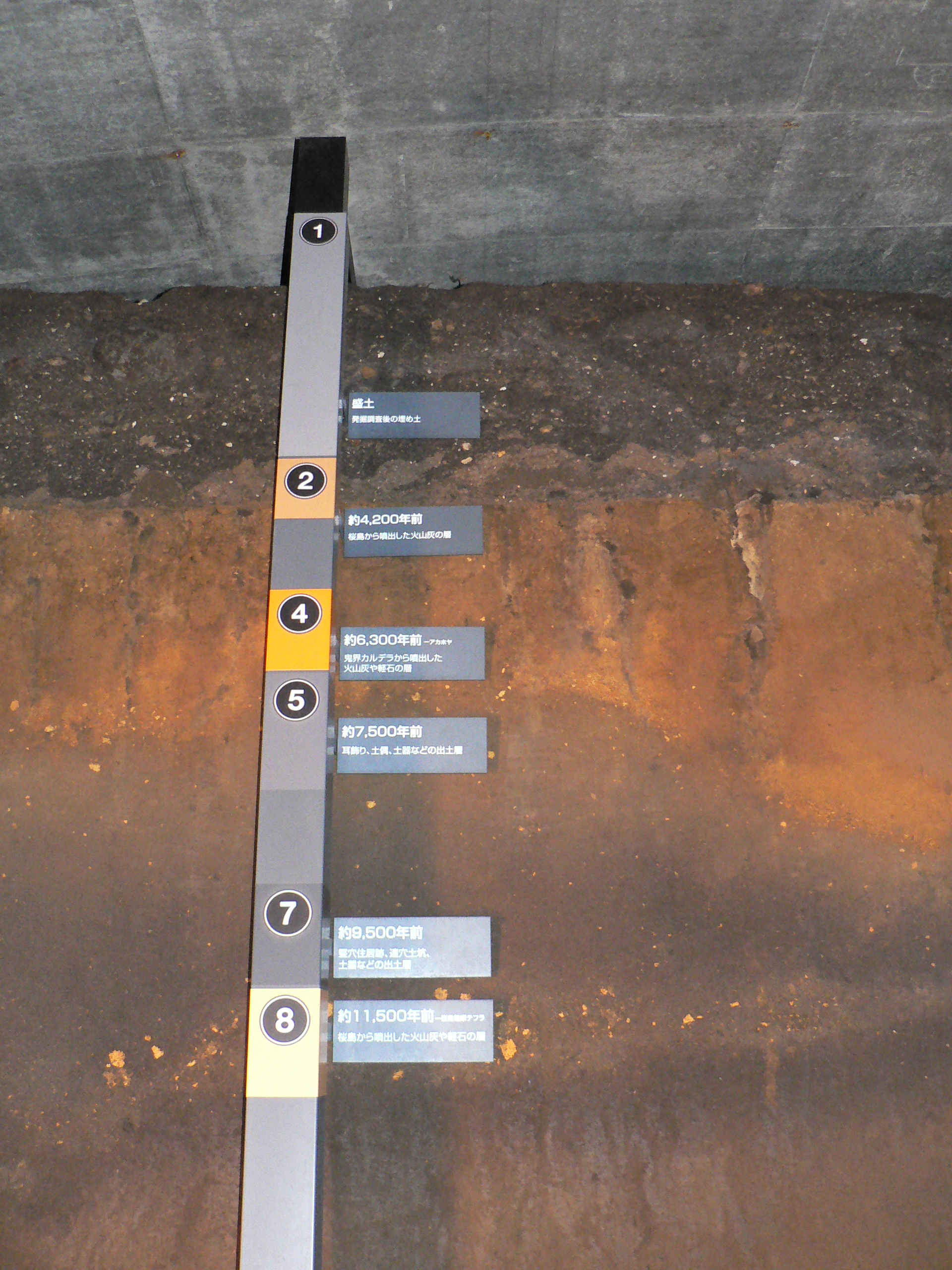 上野原遺跡の土層（地層）。鹿児島県上野原縄文の森内。2012年4月撮影。